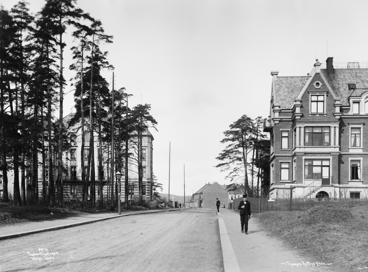 Thomas Heftyes gate 1903. Nr 23 til høyre, nr. 34 bak trærne til venstre.